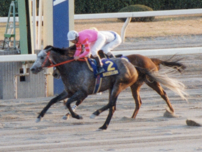 Tokyo Daishoten